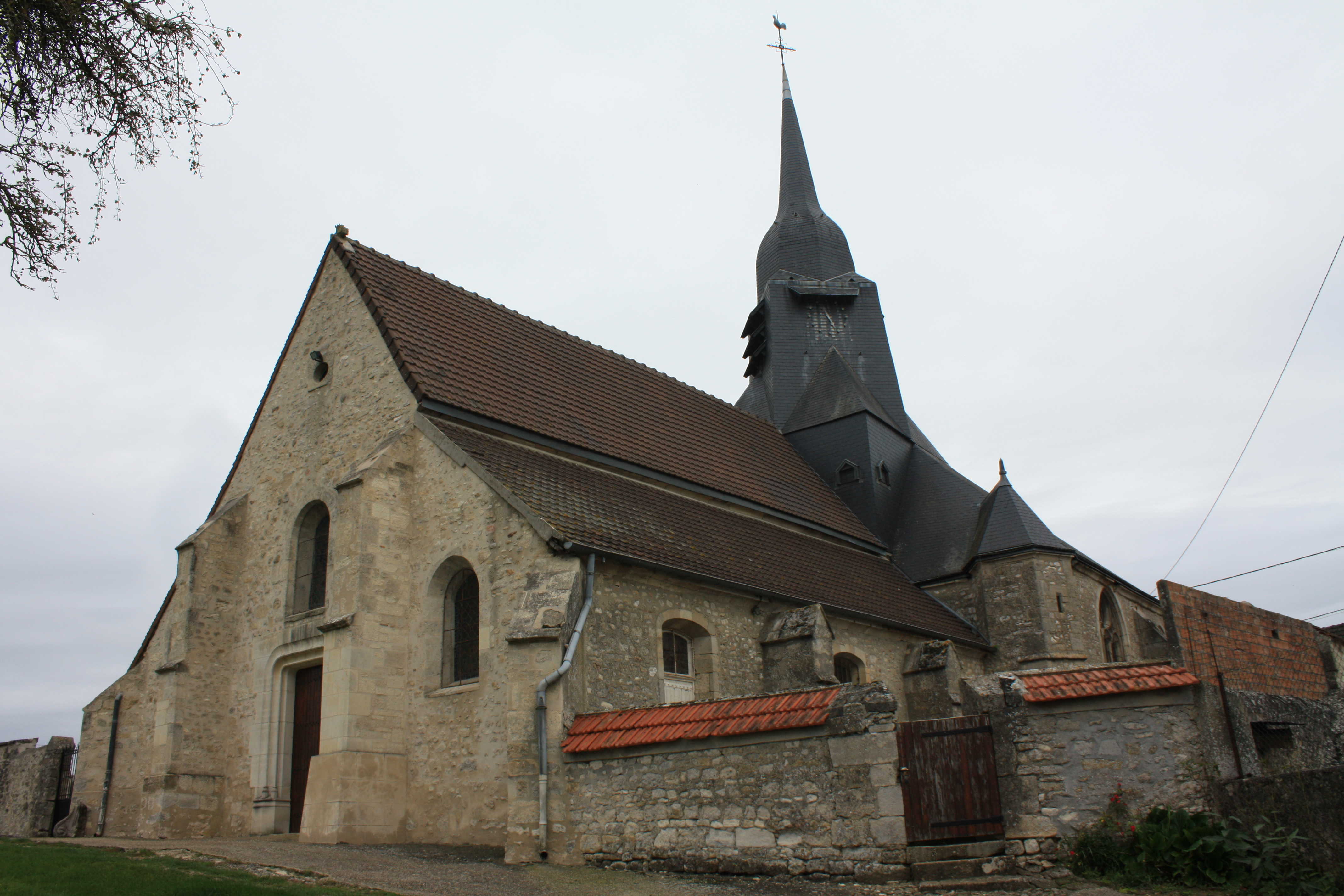 Église Saint-Remi de Chéry-Chartreuve. (Aisne, région Picardie).